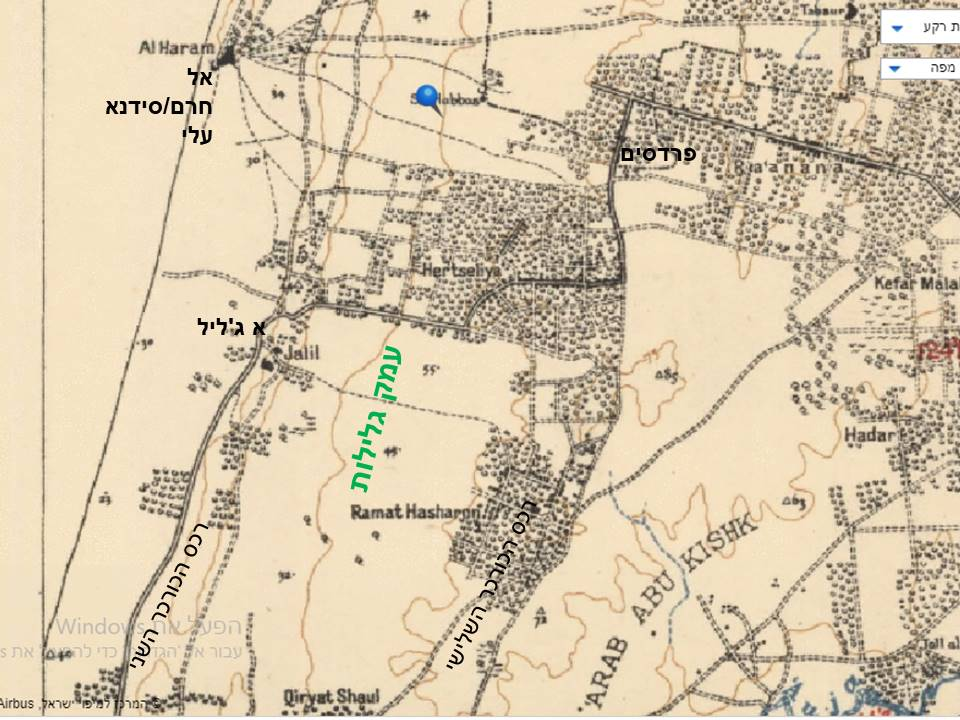 עמק גלילות כפי שהיה בשנת 1935